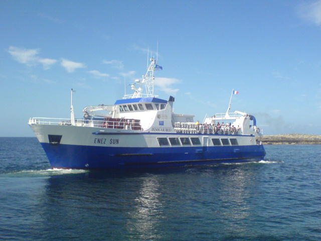 1=photo de l'Enez Sun 3 à l'île de Sein, assurant la desserte de cette île. IMO number: 7398652 Callsign: FSLN